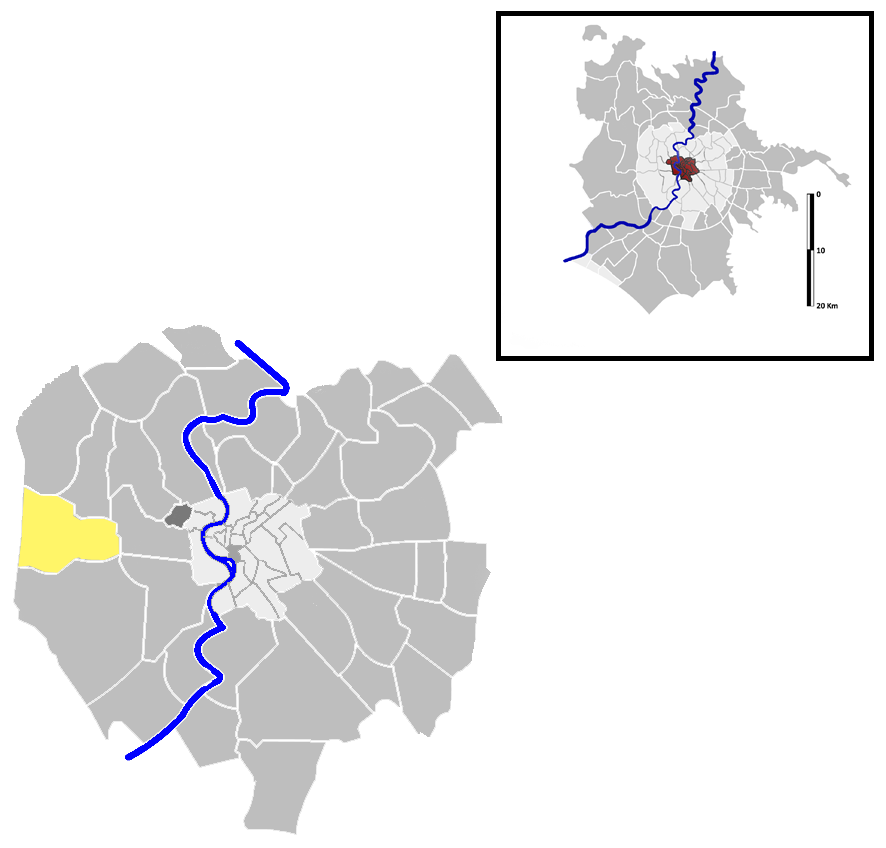 Aurelio